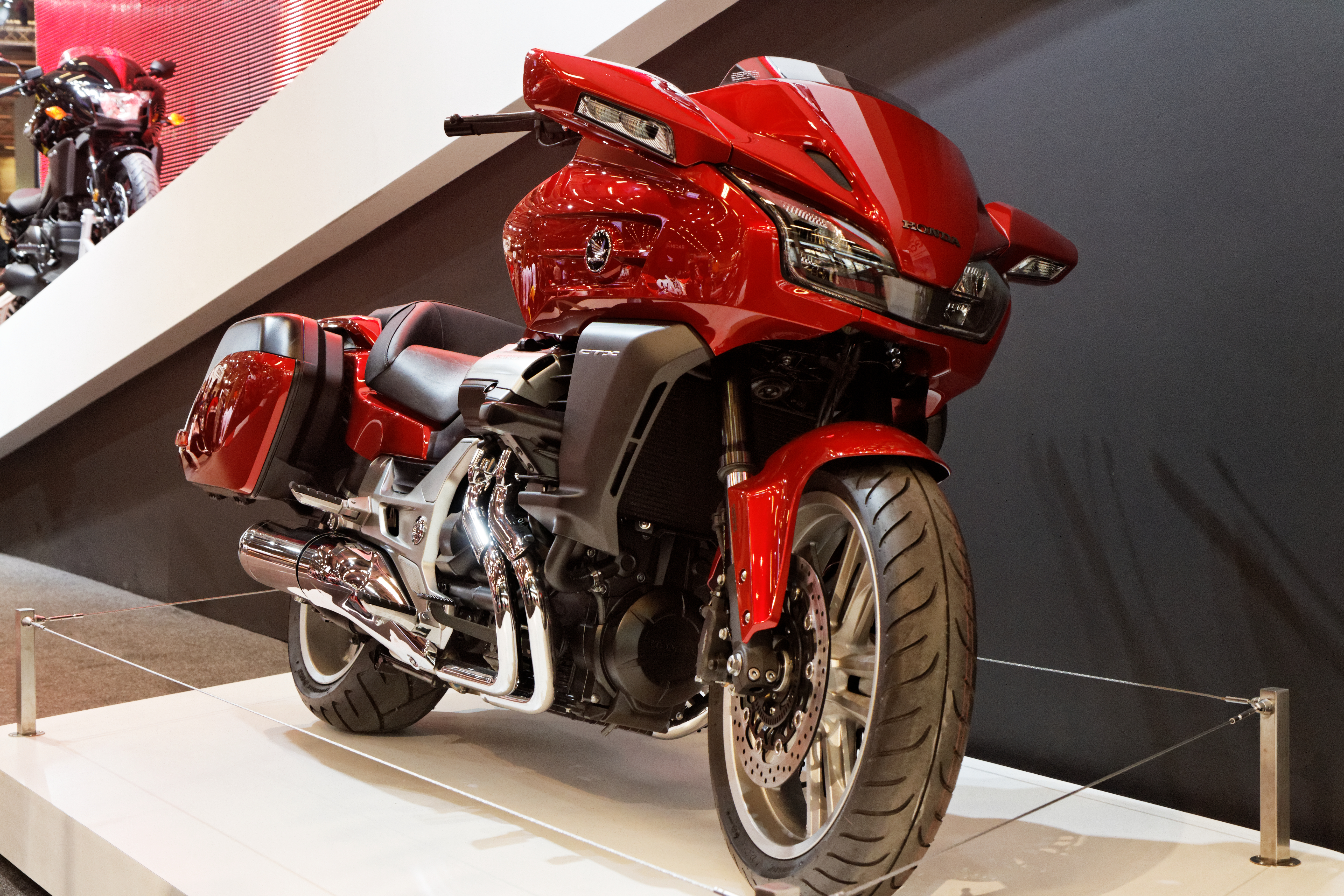 Une Honda CTX présentée lors du salon de la moto 2013.